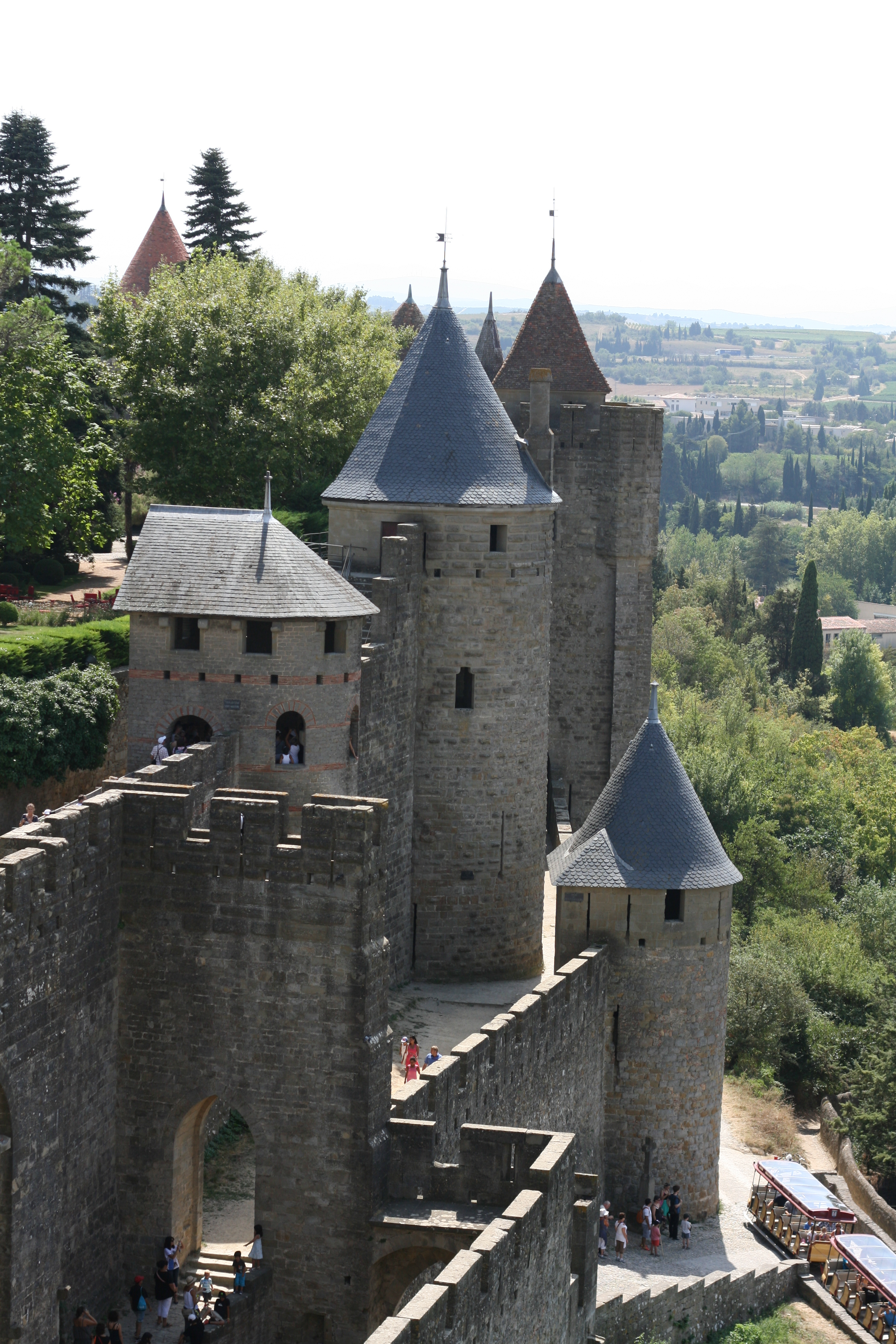 Rempart de la cité médiévale de Carcassonne (Aude, France).